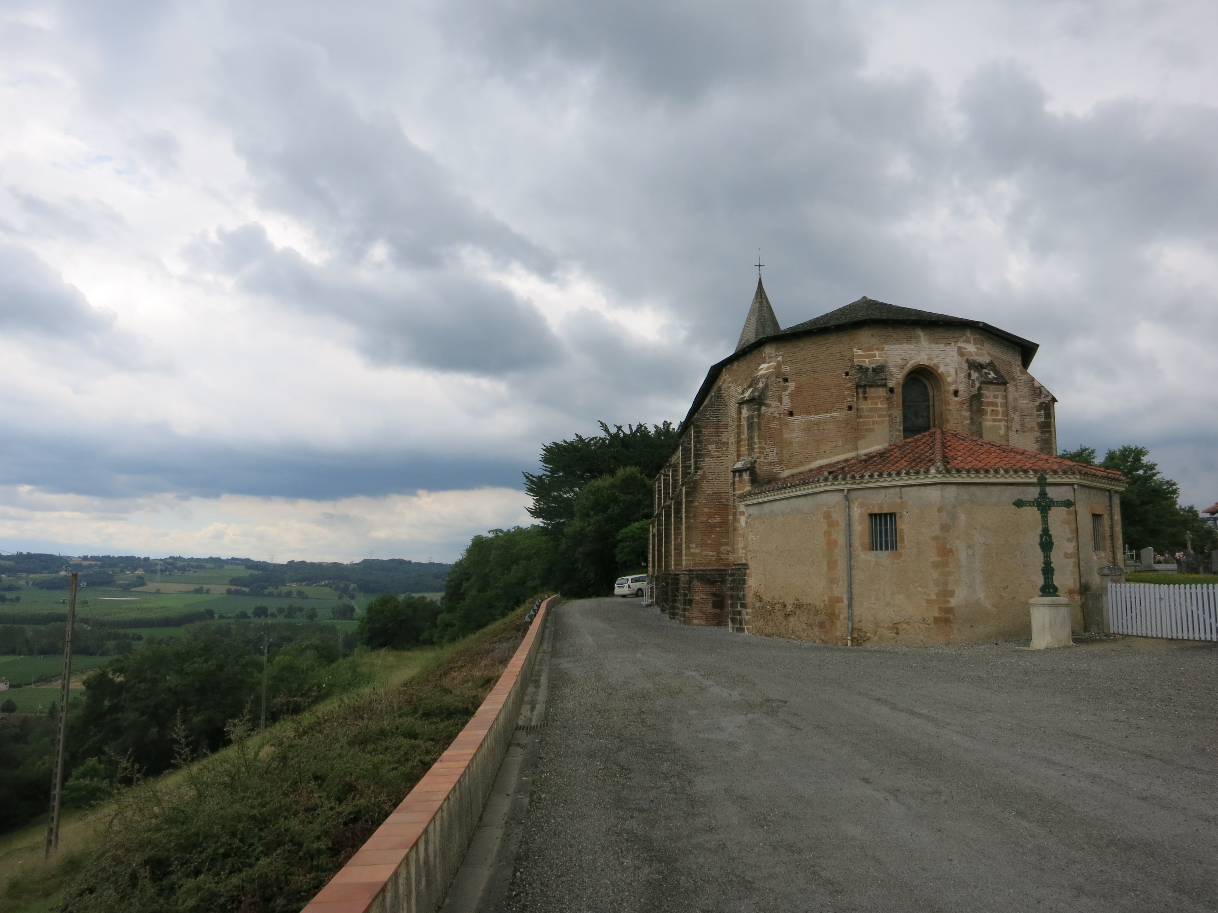 Notre-Dame-de-l'Assomption, à Montégut-Arros, et panorama